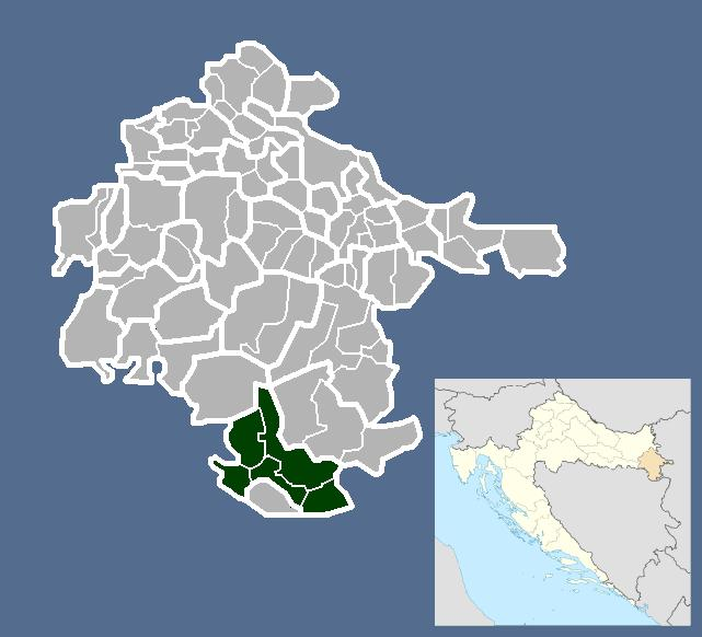 Српски (ћирилица): Општина Дреновци.